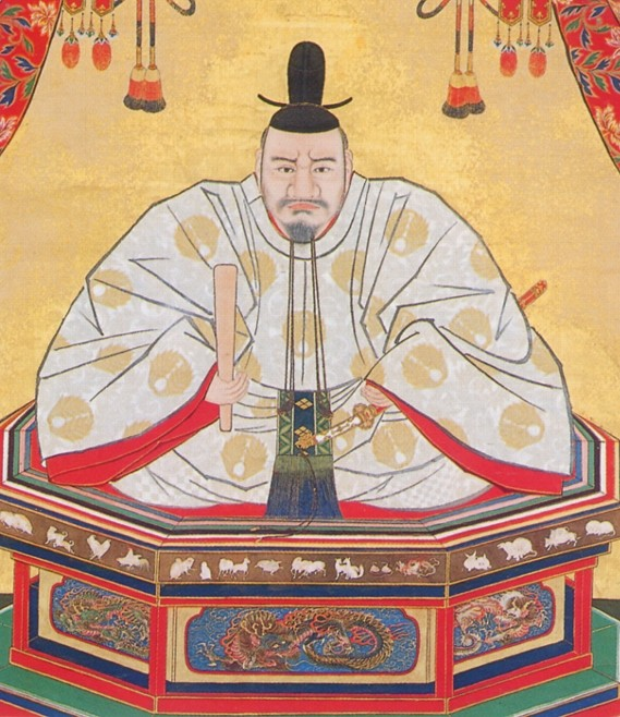 鍋島直茂。Nabeshima Naoshige.